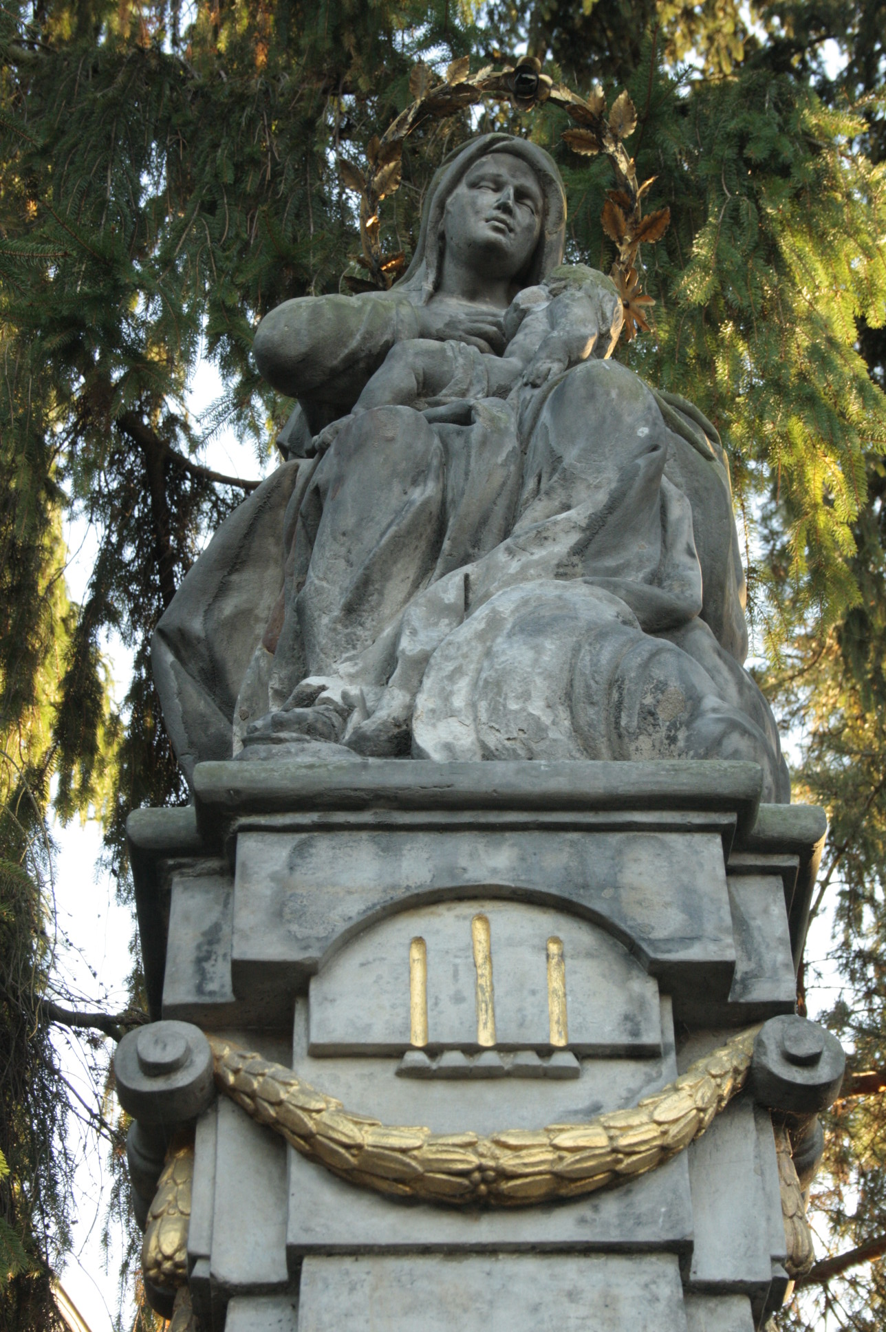 Václav Hendrych; 1801; Litomyšl; Trstěnická ulice